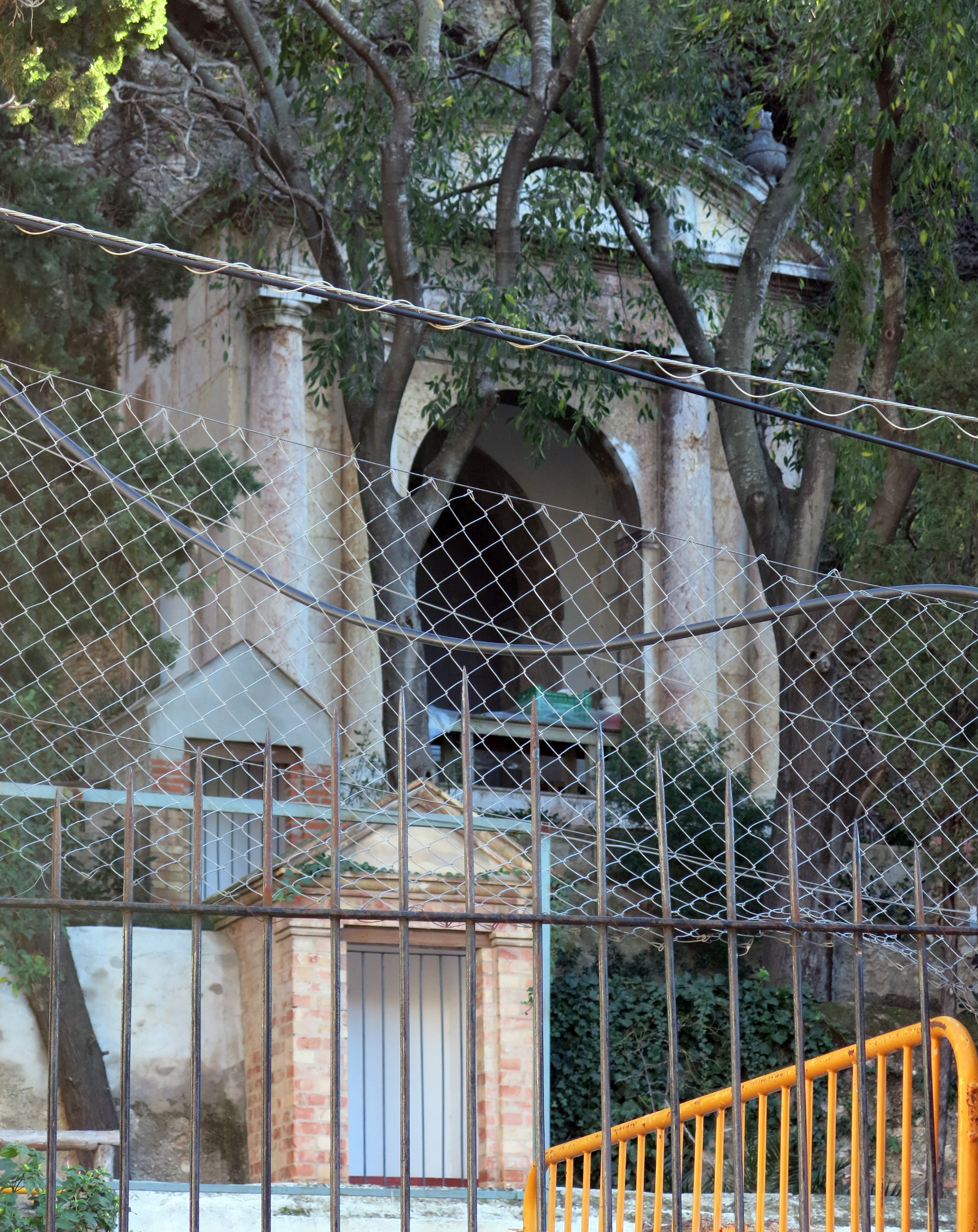 El Calvari (Tortosa)